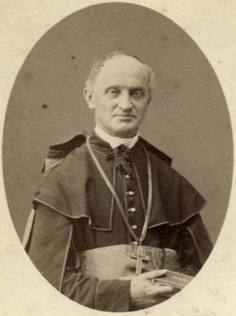 Jakob Ignaz Maximilian Stepischnegg, Bischof von Marburg (Maribor)